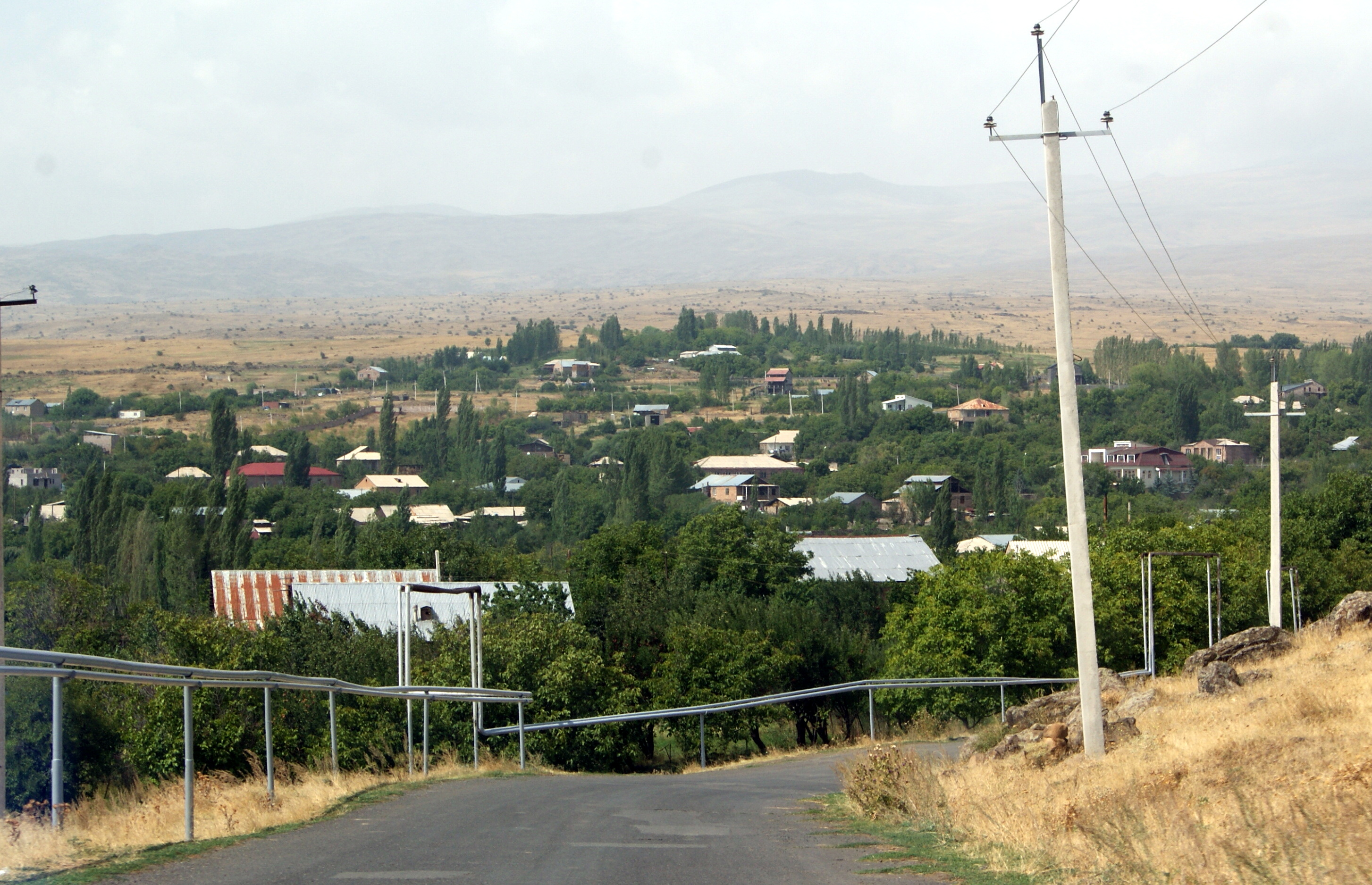 Սաղմոսավան 93/4